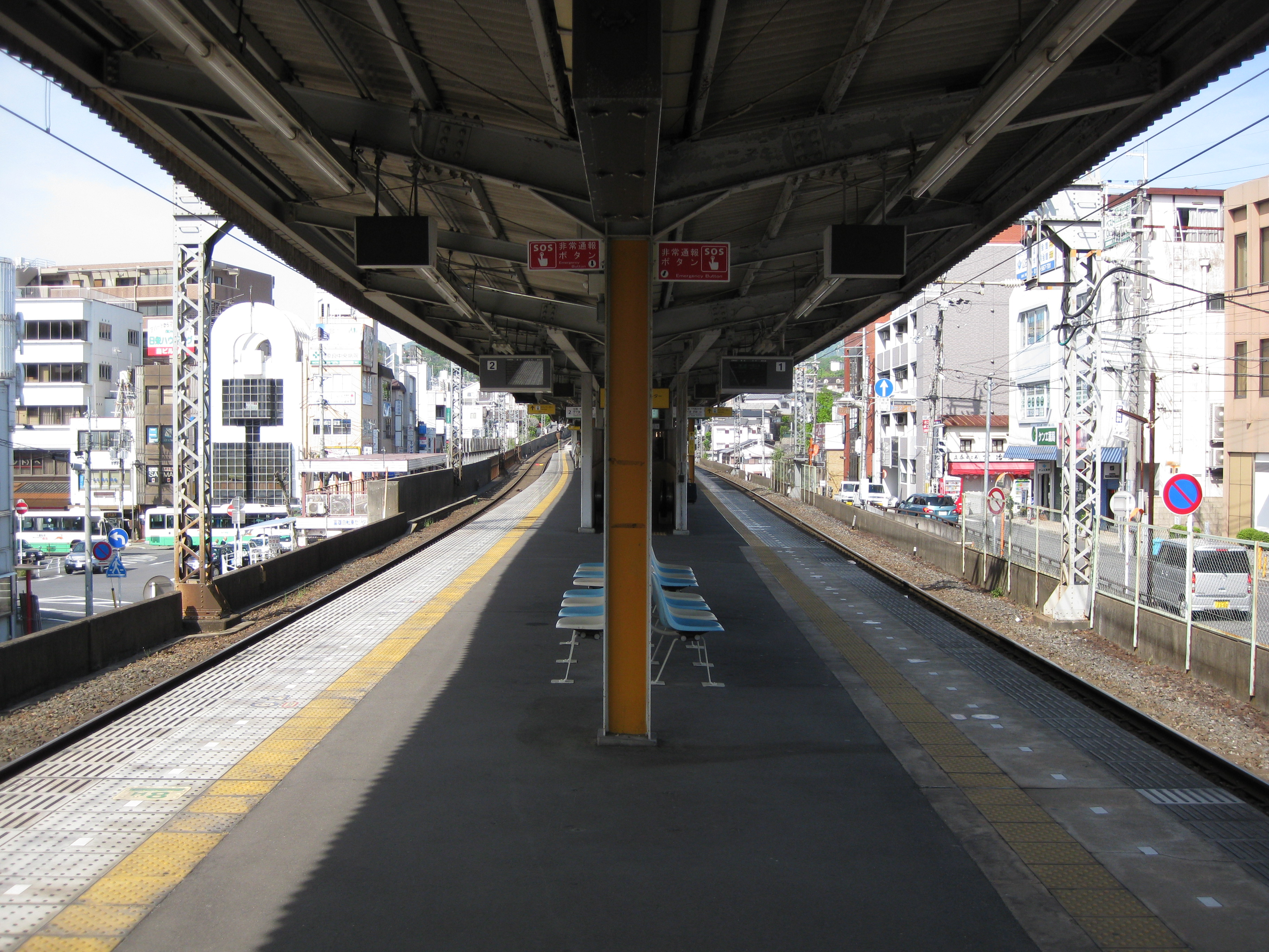 富雄駅プラットホーム